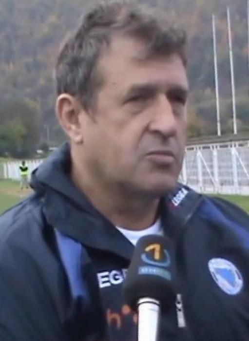 Safet Sušić 2013.